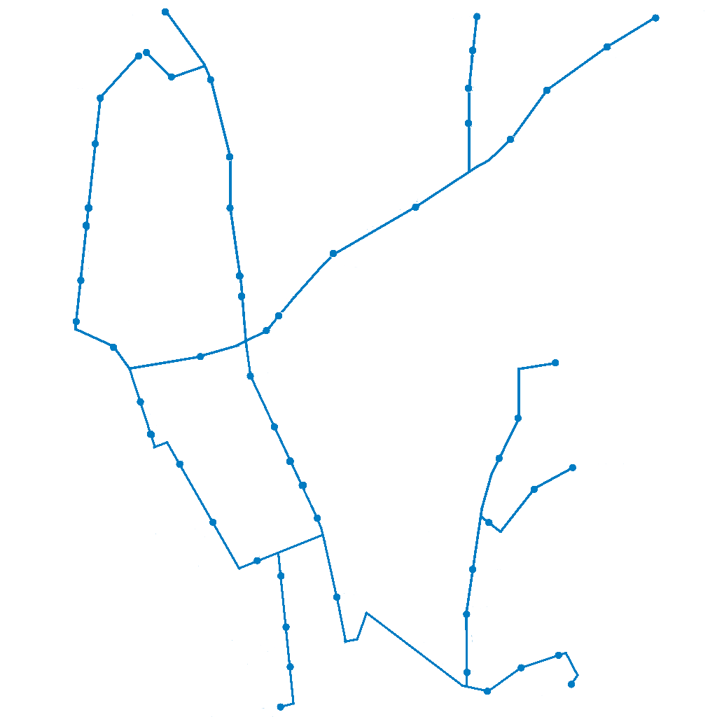 Prešov trolleybus map